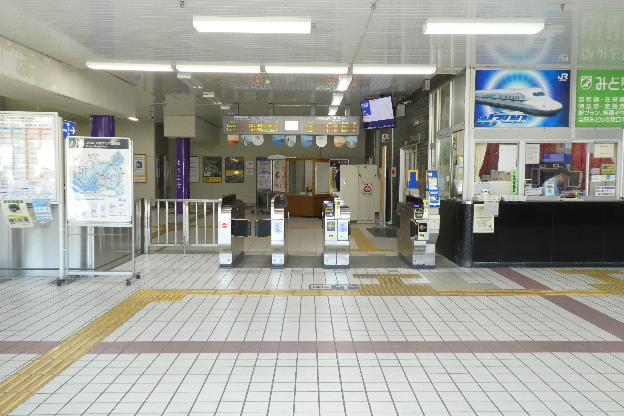 JR天理駅改札。